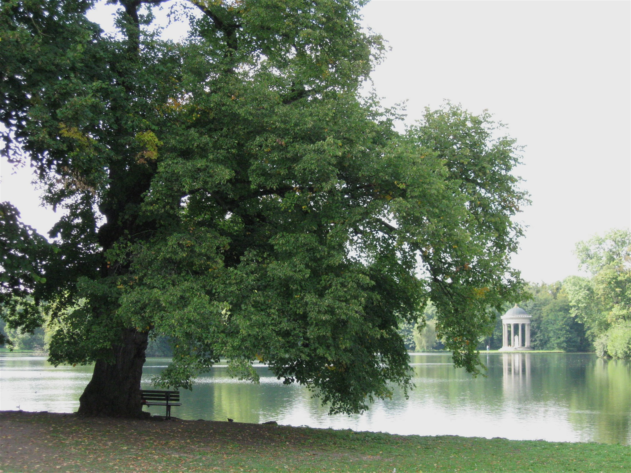 Sommerlinde am Badenburger See, Naturdenkmal, Nymphenburg, München